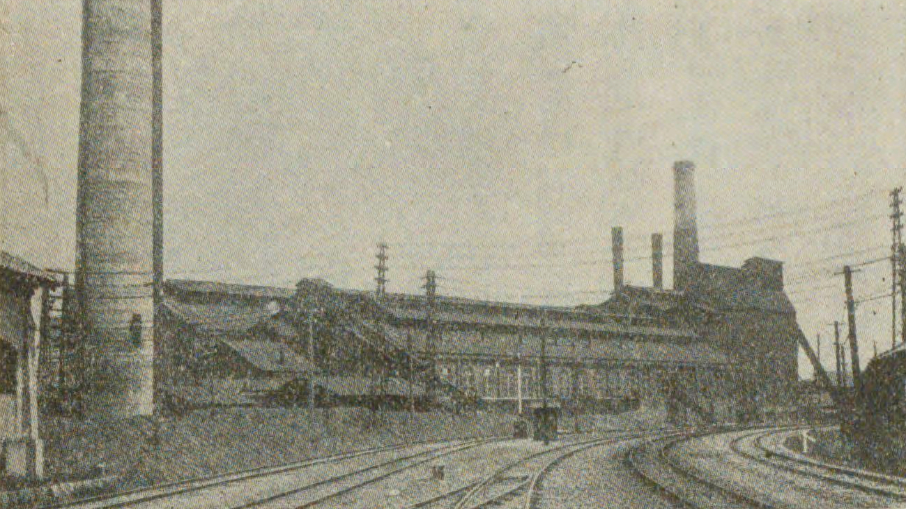 九州電気軌道が建設した大門火力発電所（1911 - 1958年）